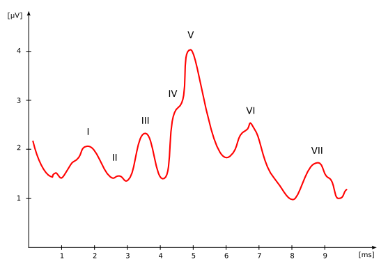 Typical ABR (Auditory Brainstem Response). Author: me (Stanislaw Raczynski), based on drawings from book "Fizjologia człowieka z elementami fizjologii stosowanej i klinicznej" by many authors. Created using Inkscape.